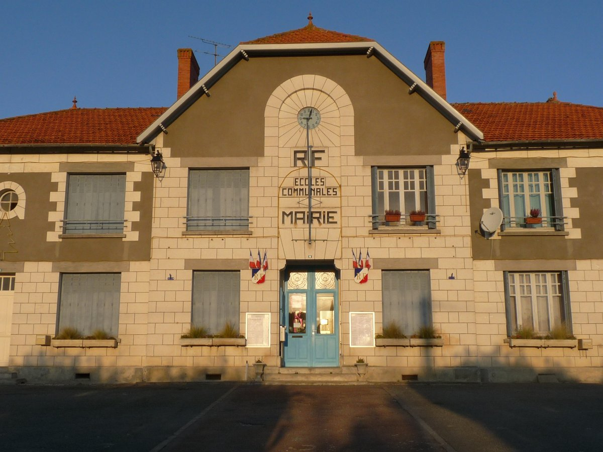 Mairie de St-Dizant-du-Gua, Charente-Maritime, France